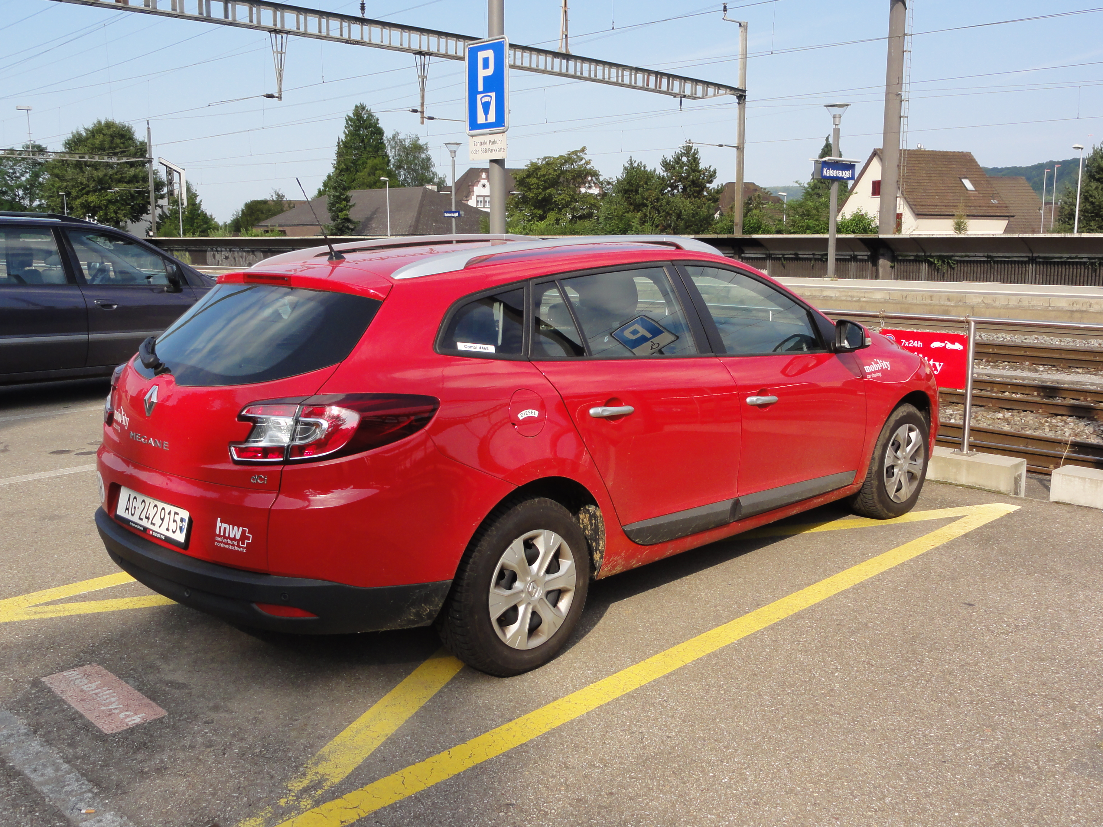 Kaiseraugst AG, car sharing (Renault Mégane) GPS data may be inaccurate. EXIF data regarding date and time may be inaccurate.